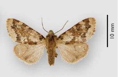 Leichosila wagneri male